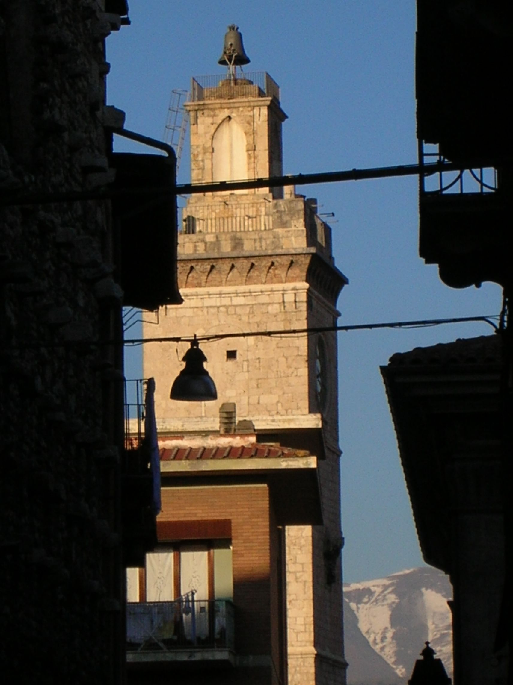 Torre palazzo Civico de L'Aquila vista da Piazza Duomo